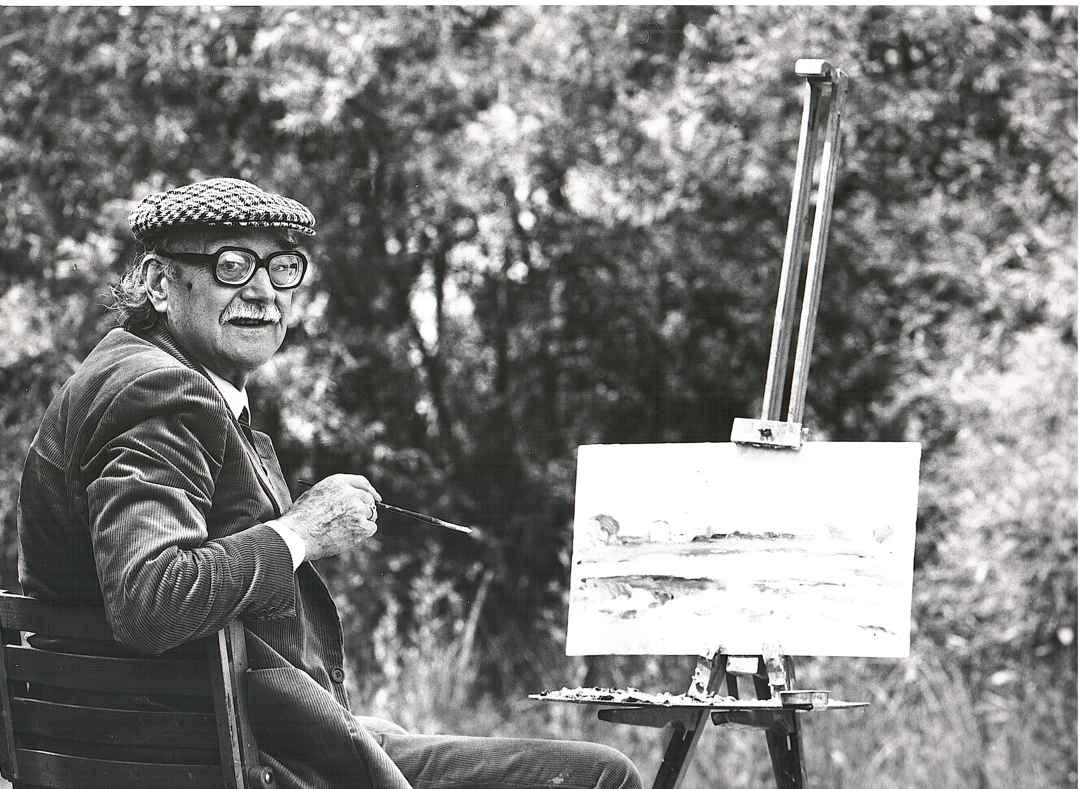 Il pittore Nando Coletti